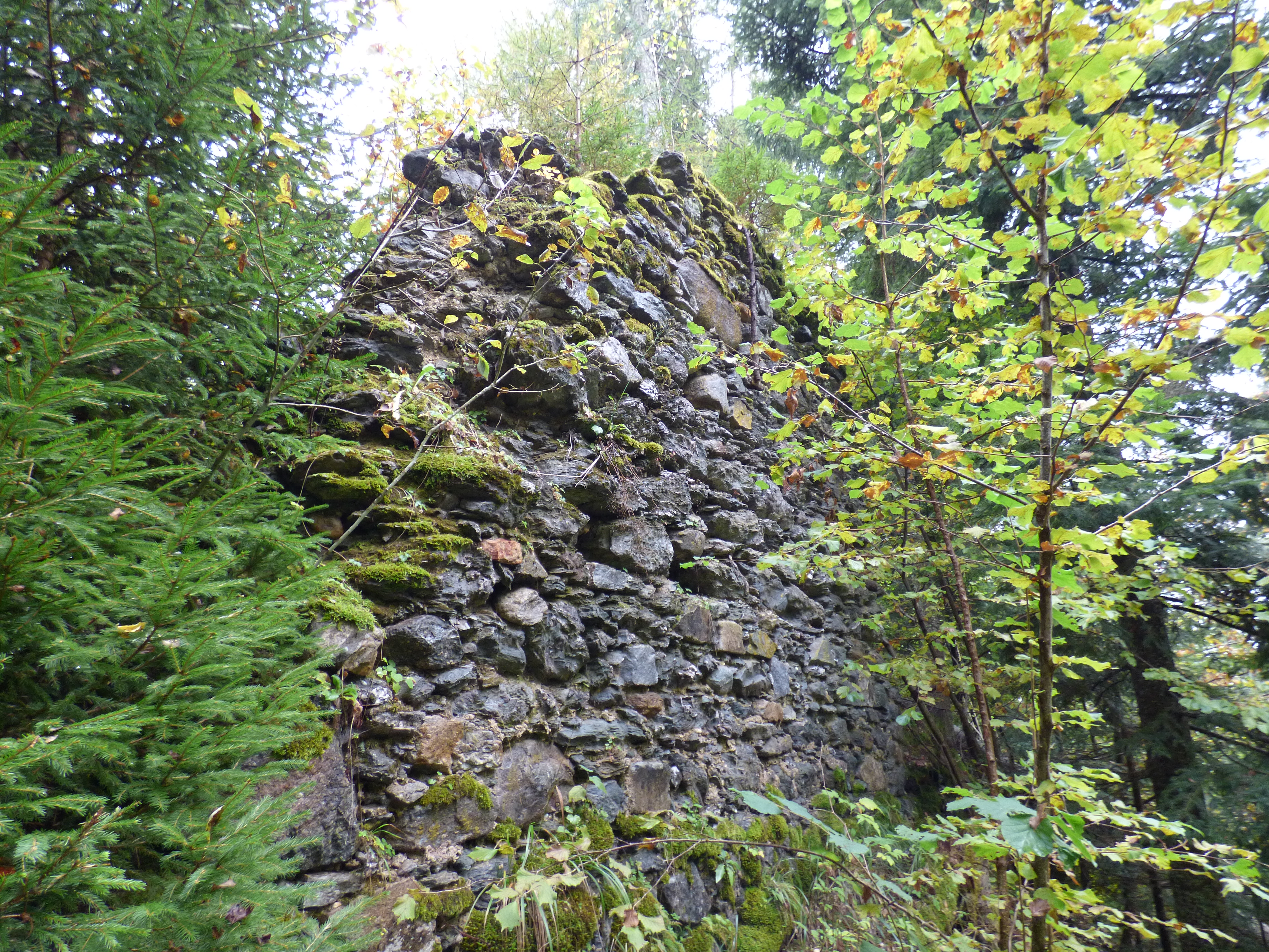 Burgruine Steuerberg (Marbauerschloss), Gemeinde Steuerberg, Kärnten. Mauer im südlichen Teil